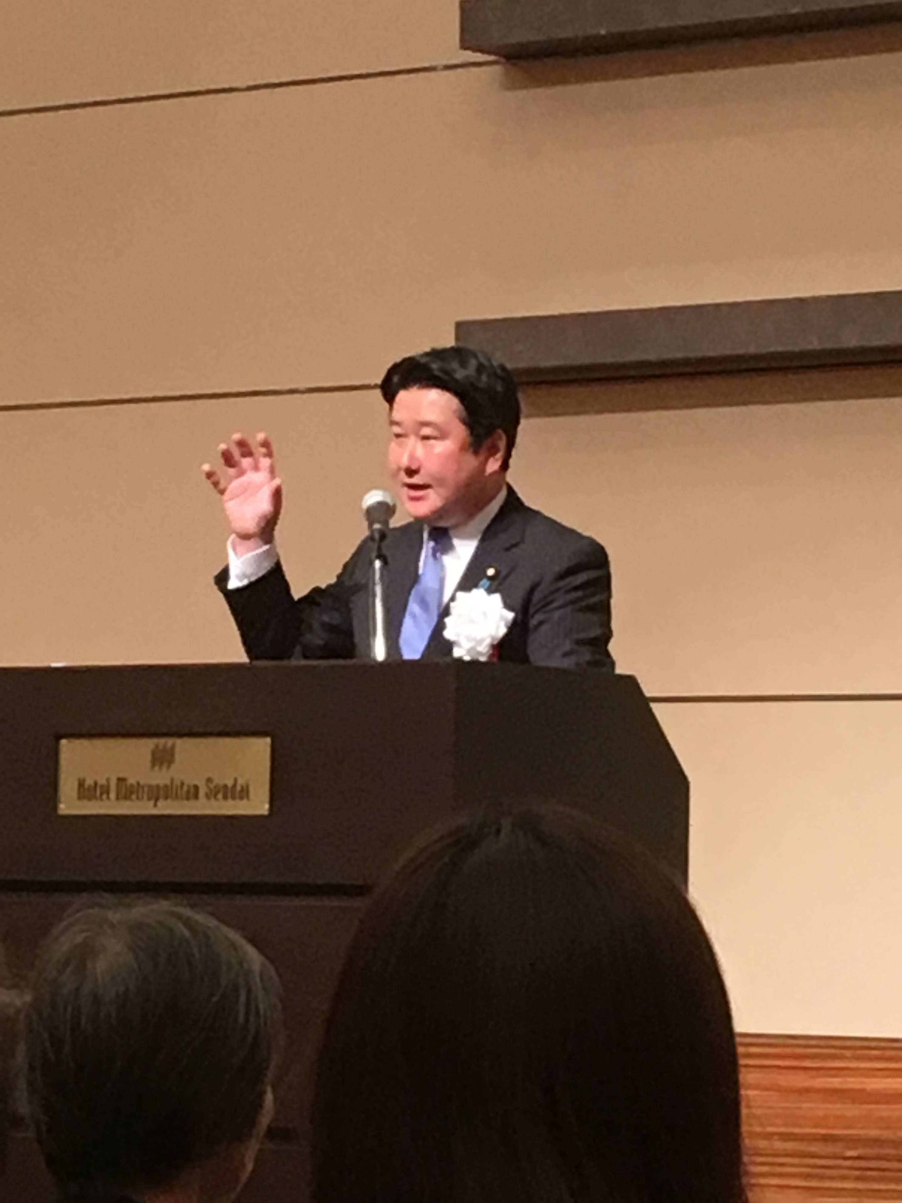 参議院議員・和田政宗。2016年7月4日、第24回参議院議員選挙宮城選挙区の自民党・日本のこころを大切にする党合同演説会にて。